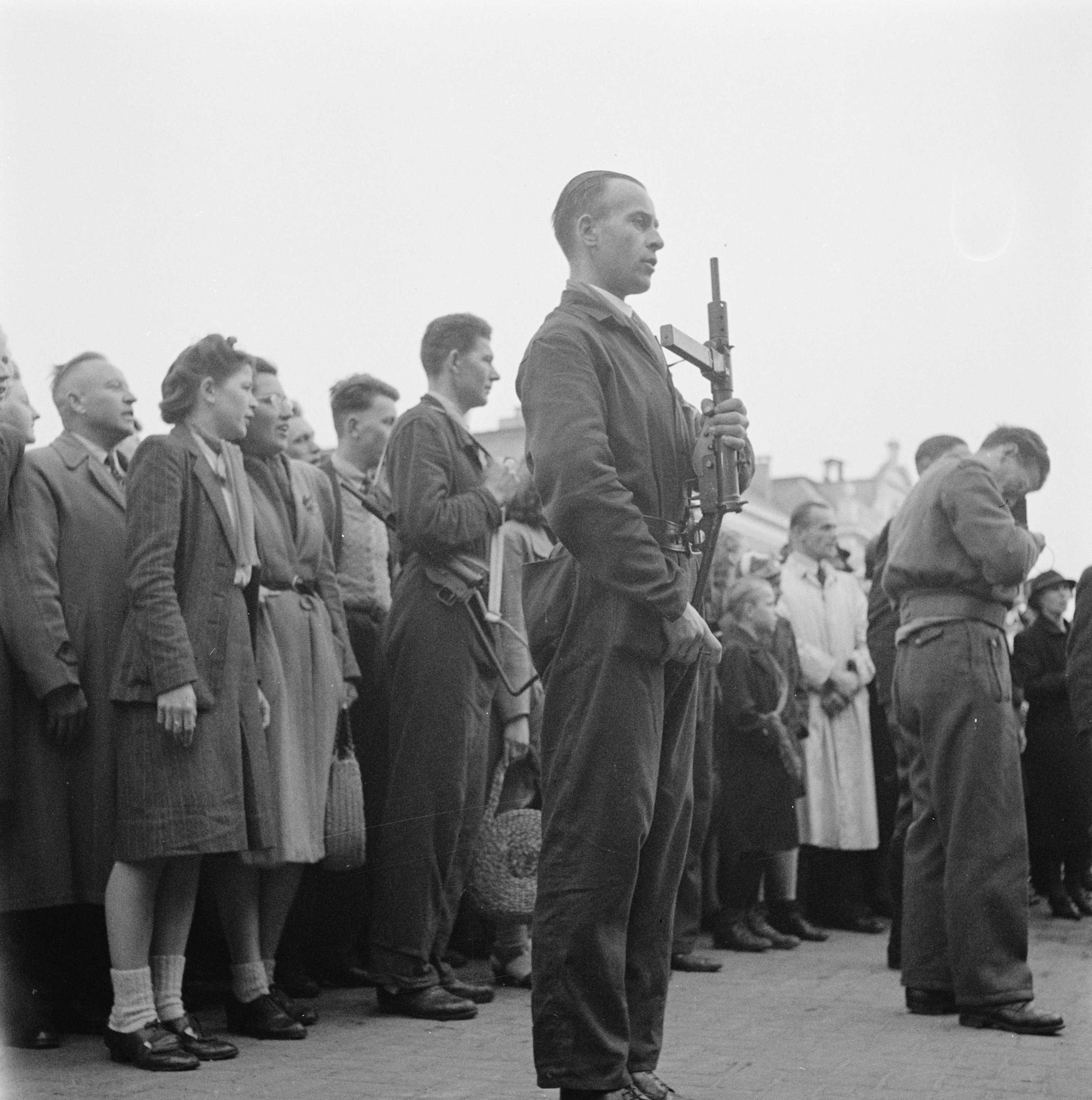 Collectie / Archief : Fotocollectie Anefo Reportage / Serie : Front Noord-Oost Nederland: rondreis Prins Bernhard Beschrijving : Een lid van de Binnenlandse Strijdkrachten (BS) presenteert geweer (een stengun) in Enschede Datum : april 1945 Locatie : Enschede, Overijssel Trefwoorden : militairen Fotograaf : Poll, Willem van de / Anefo, [onbekend] Auteursrechthebbende : Nationaal Archief Materiaalsoort : Negatief (zwart/wit) Nummer archiefinventaris : bekijk toegang 2.24.01.03 Bestanddeelnummer : 900-2542